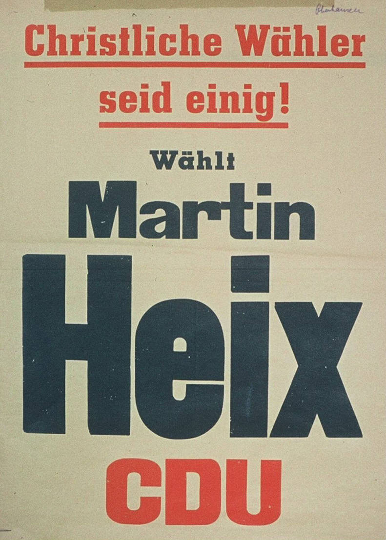 Christliche Wähler seid einig! Wählt Martin Heix CDUPlakatart:Kandidaten-/Personenplakat ohne PorträtObjekt-Signatur:10-001: 100Bestand:Plakate zu Bundestagswahlen (10-001)GliederungBestand10-18:Plakate zu Bundestagswahlen (10-001) » Die 1. Bundestagswahl am 14. August 1949 » CDU » Ohne PorträtfotoLizenz:KAS/ACDP 10-001: 100 CC-BY-SA 3.0 DE